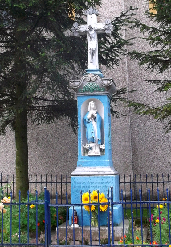 Przedwojów - rzymskokatolicki kościół filialny p.w. św. Józefa Oblubieńca, 1693-1696